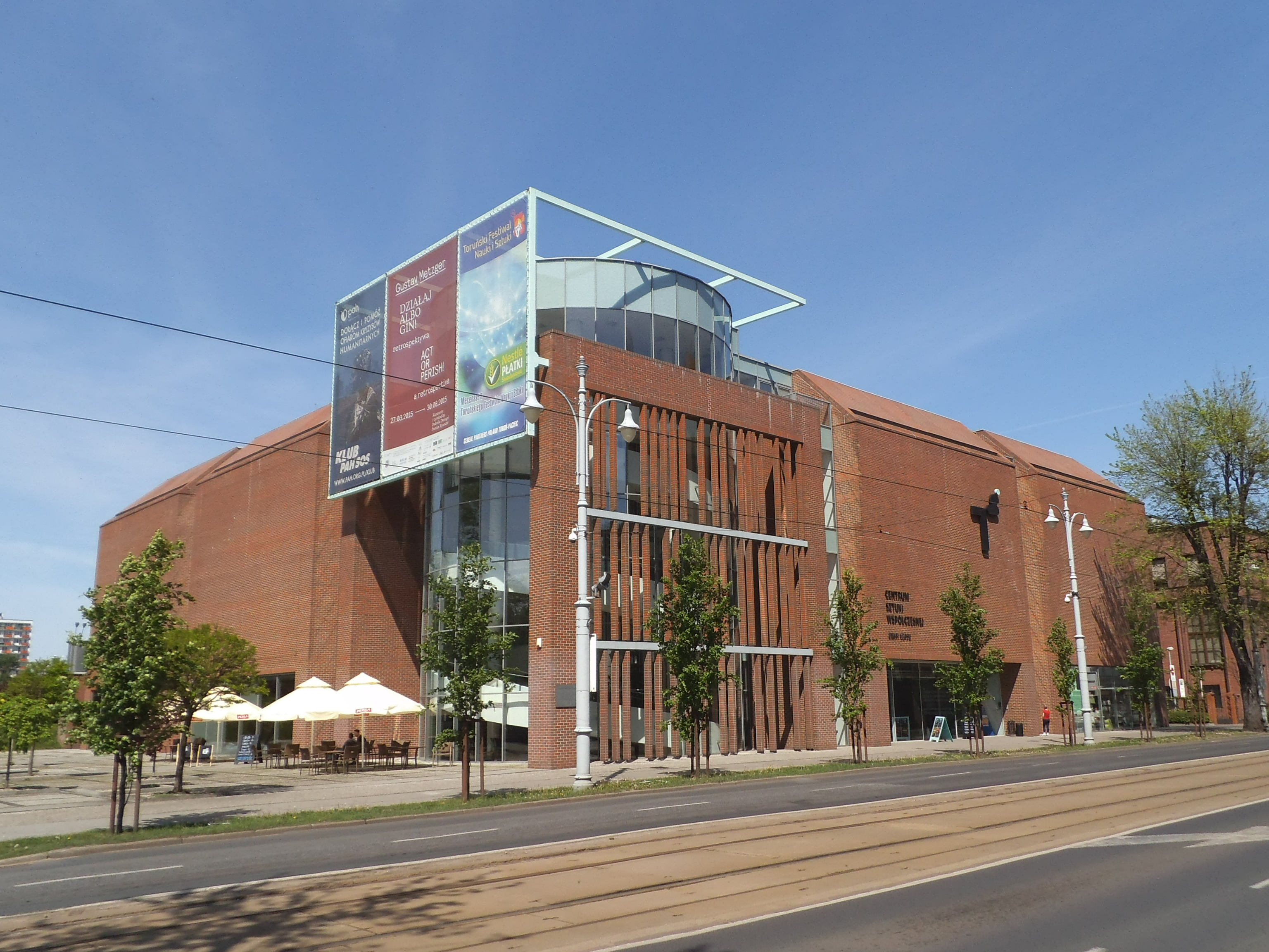 CSW w Toruniu